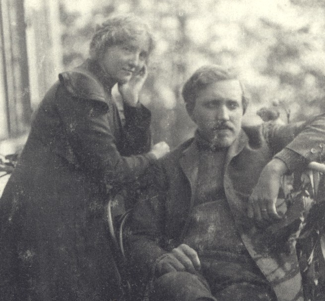 Olga Granner/Milles och Carl Milles 1903